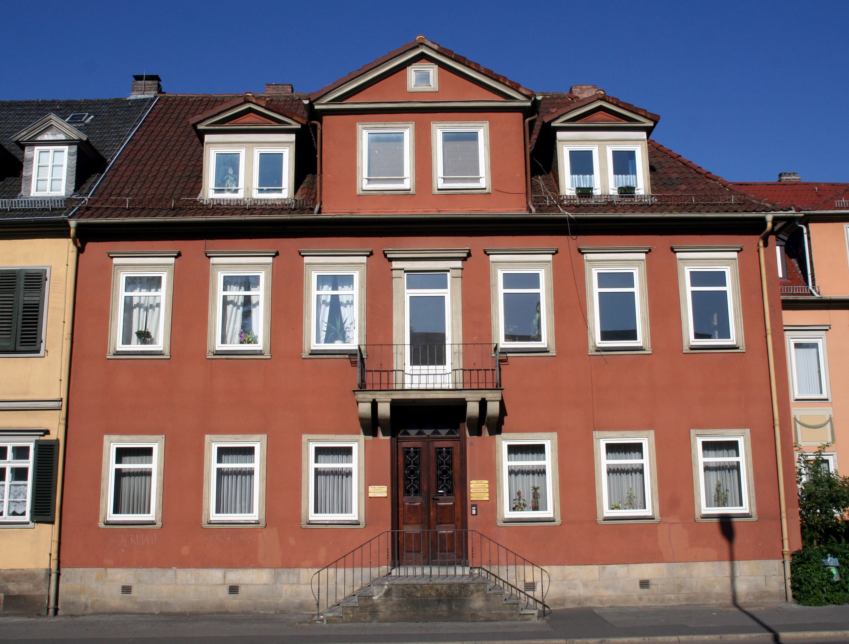 Ketschendorferstraße 6 in Coburg